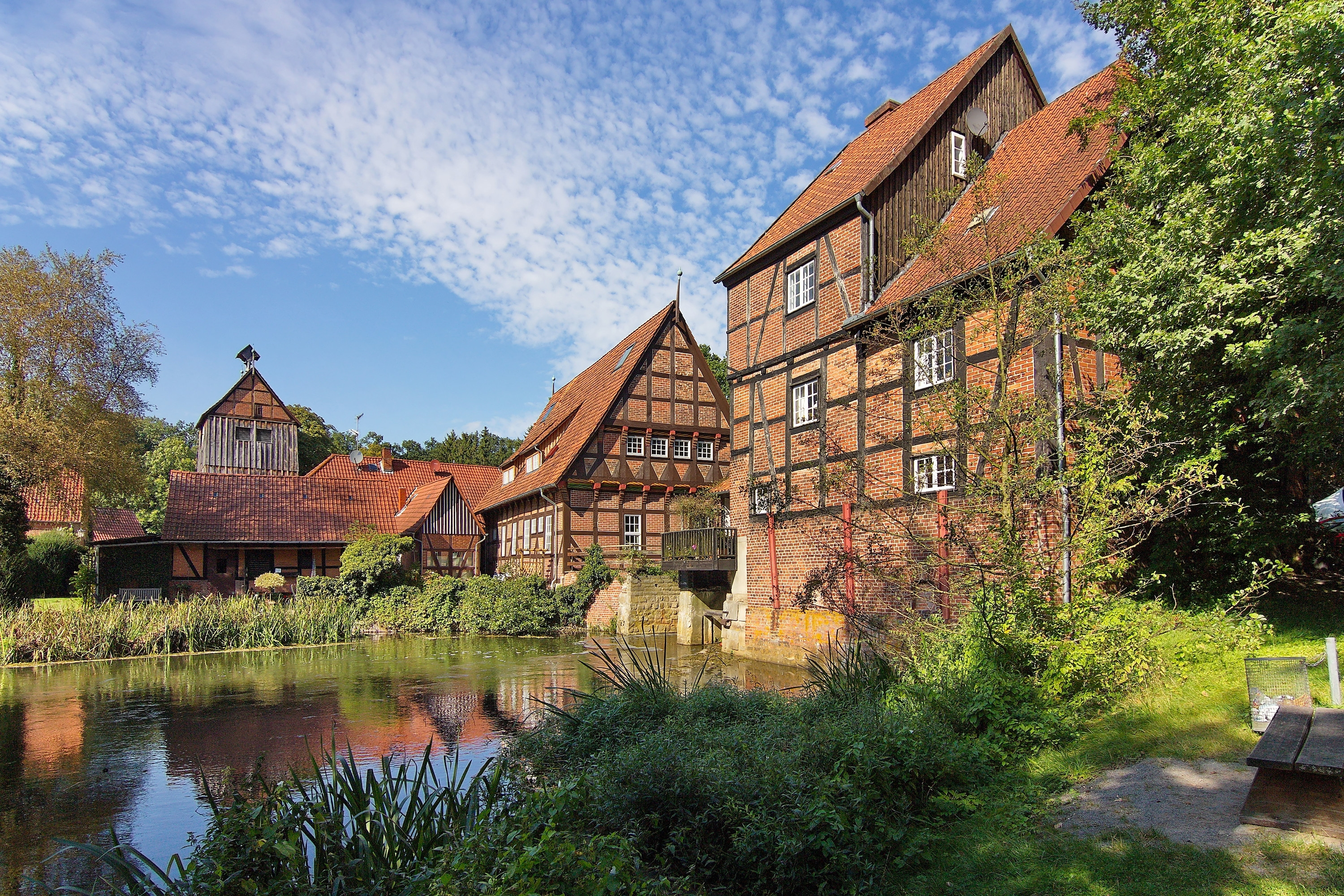 Eine Mühle in Wienhausen wurde schon 1351 erwähnt, das heutige kleinere Mühlengebäude stammt von 1591, das mehrgeschossige auf dem linken Ufer des Mühlkanals entstand im 18. Jhd.